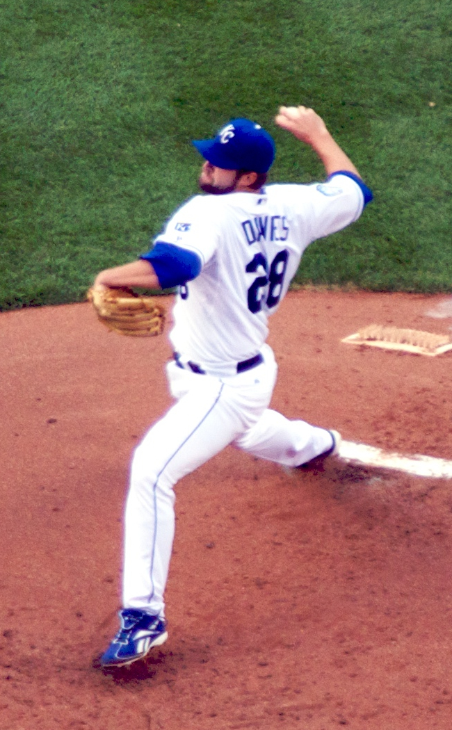 Kyle Davies